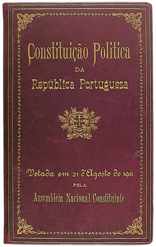 Constituição Política da República Portuguesa pela Assembleia Nacional Constituinte Portuguesa de 1911.